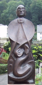 Goar - Bronzeplastik in St. Goar Aufnahme: September 2007 Url